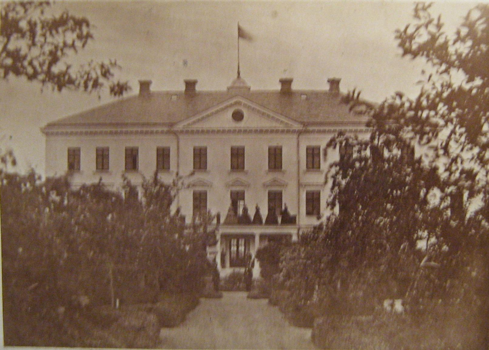 Fotografi av Åkerhielms Ökna i Södermanland